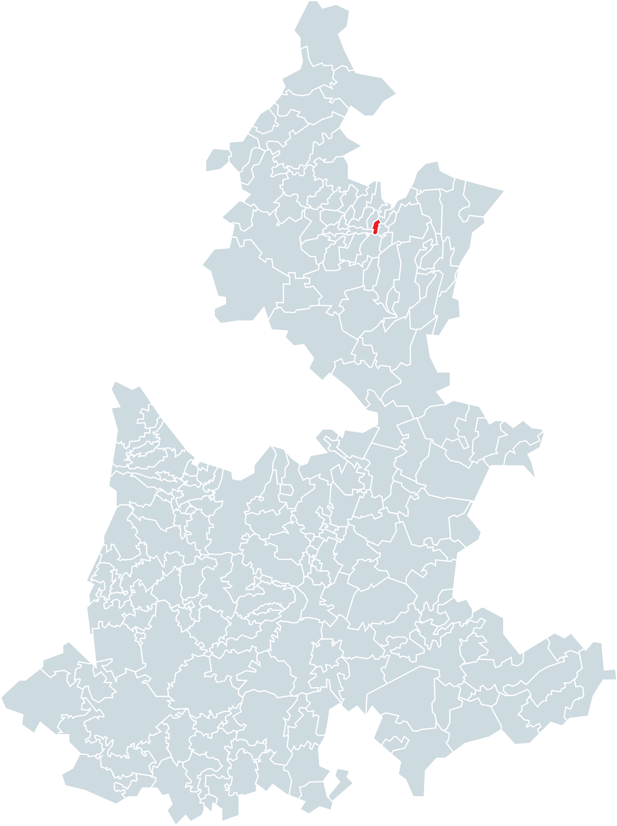 Municipio de Atlequizayan